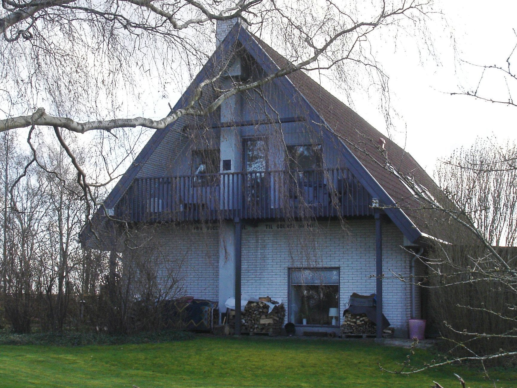 Lunde Stations NØ-gavl - under balkonen ses det gamle skilt med afstand til Odense og Bogense